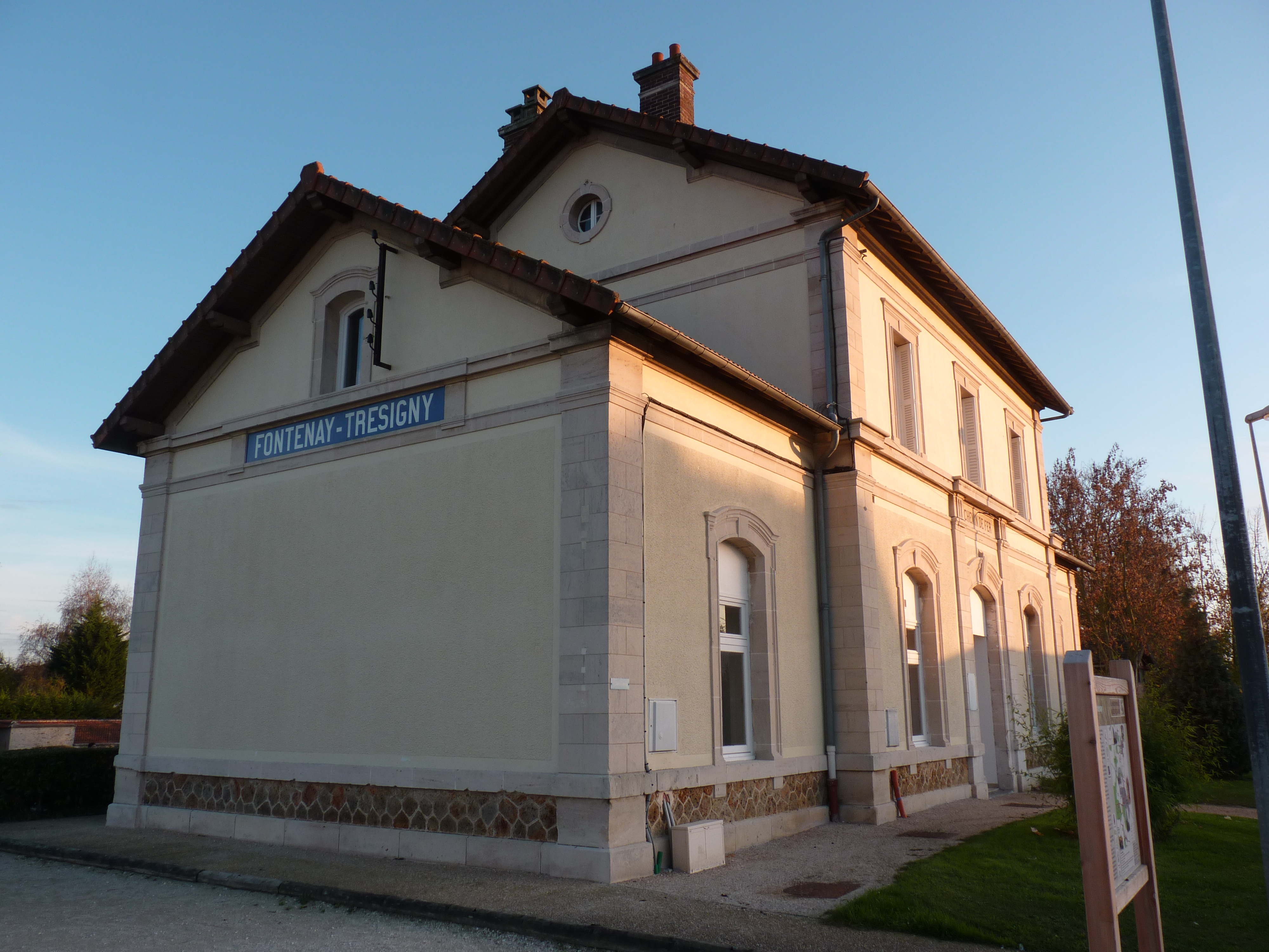 Ancienne gare de Fontenay-Trésigny sur la ligne de Paris-Bastille à Marles-en-Brie.